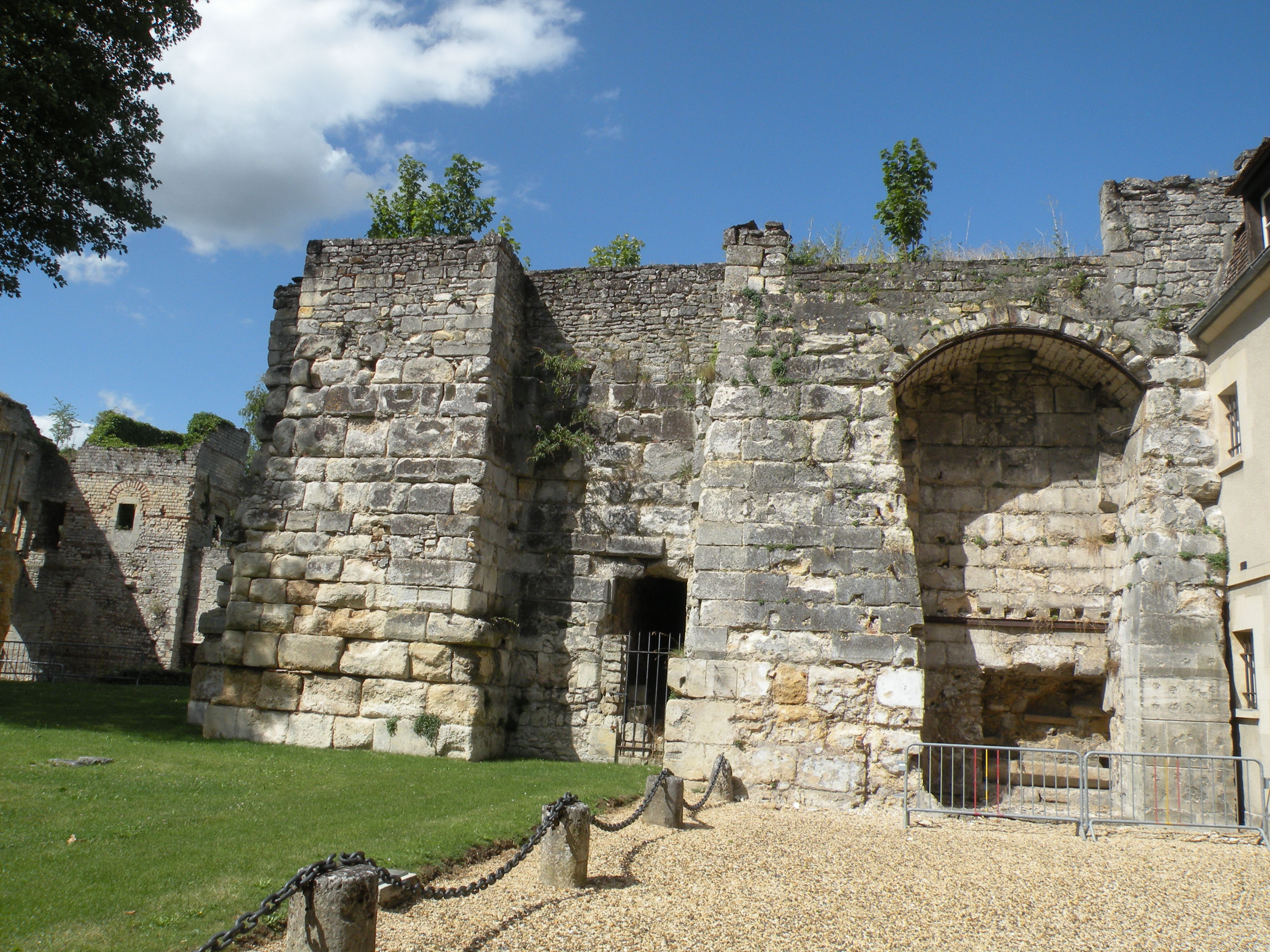 Château royal de Senlis (Oise) : tour carrée médiévale, probablement construite au Xe siècle en réemployant des blocs antiques. Elle s'apparente à un donjon, mais sa finalité demeure incertaine, étant donné son implantation derrière la muraille gallo-romaine. Mesurant 21,5 m x 17,0 m au sol, la tour contient une salle basse rectangulaire remaniée à l'époque gothique, derrière des murs de 4,5 m d'épaisseur. La partie supérieure de la tour a été rasée au XVIIe siècle.